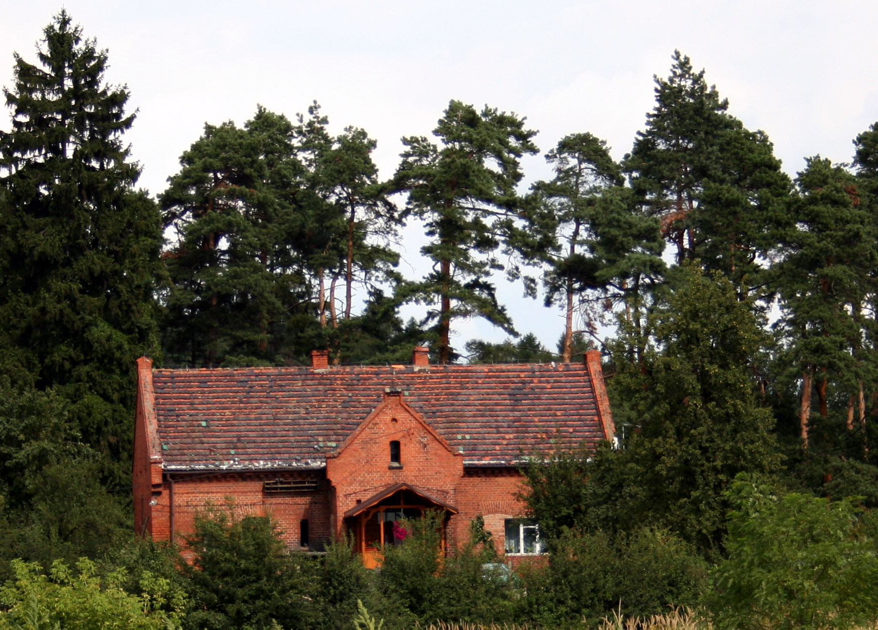 panorama_Lubomii, powiat wodzisławski, widok od strony północno-wschodniej